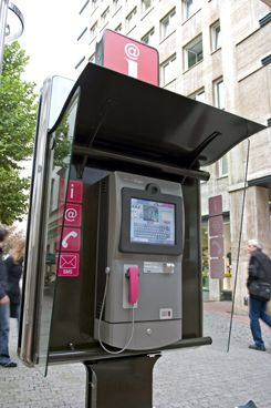 Station_multimedia_Allemagne_2006.jpg